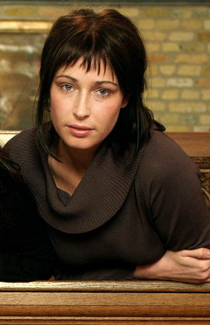 Nathalie Delcroix, del trío de folk belga Laïs